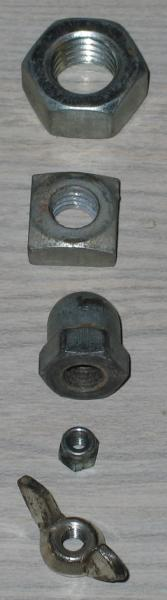 Beschreibung: Sechskantmutter, Vierkantmutter, Hutmutter, selbstsichernde Mutter, Flügelmutter Quelle: Fotografie am 06.04.2004 Fotograf: Michael Häckel Lizenzstatus: GNU FDL